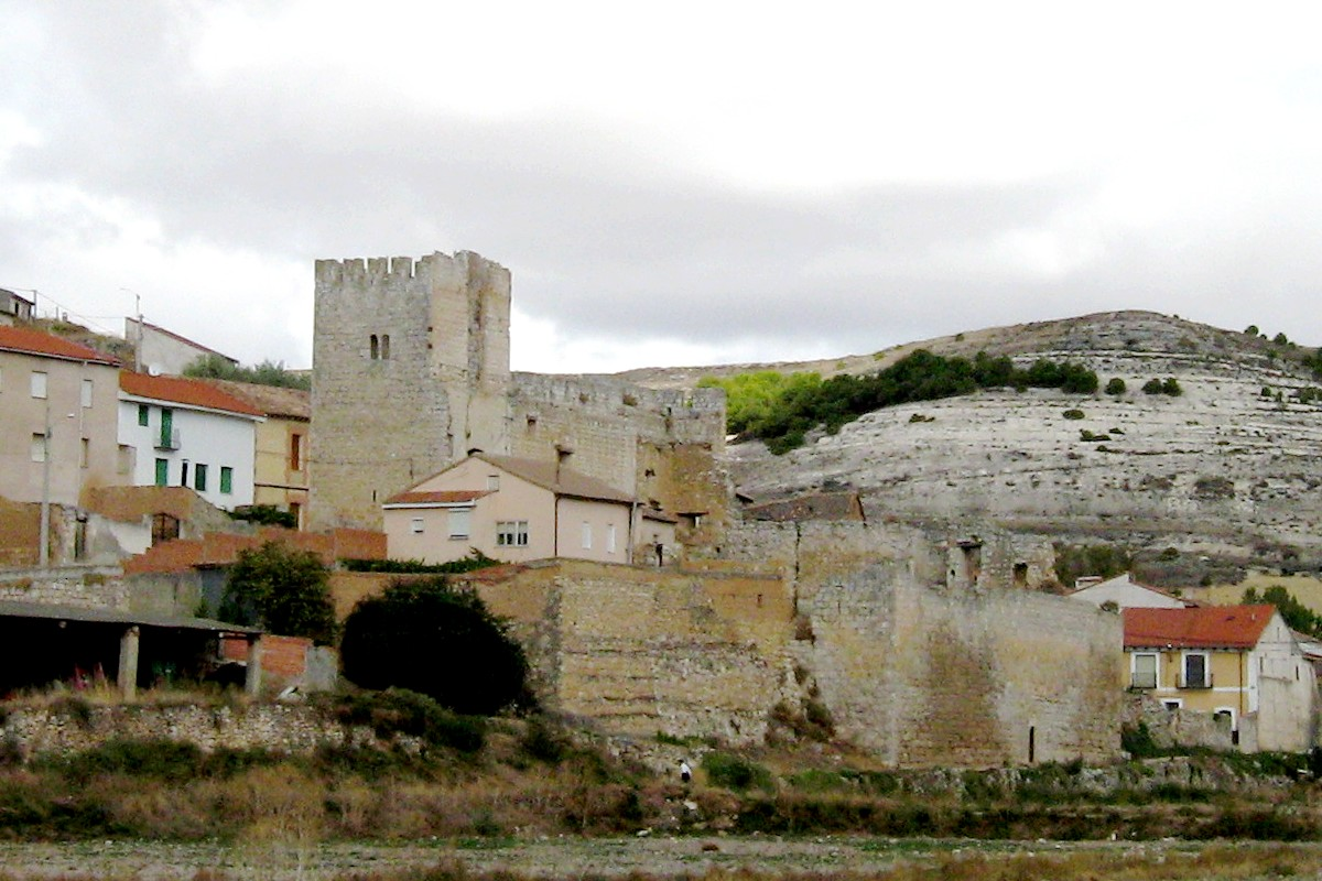 Curiel de Duero. Palacio de Zúñiga. Valle del Cuco. Valladolid